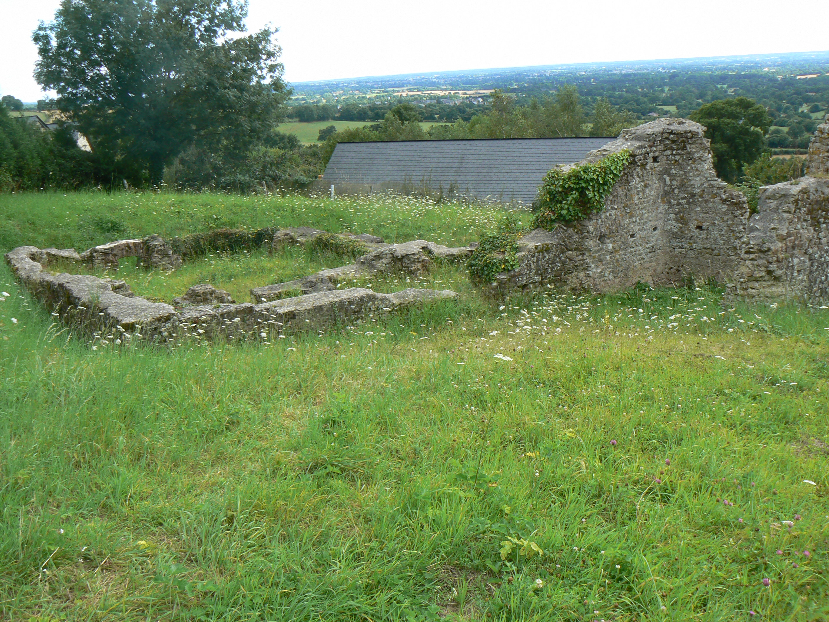 Thermes du fort du Rubricaire en Mayenne, France.